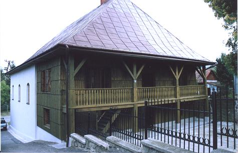 Synagoga żydowska w Bobowej, fot. B.Bogusz, 2004r.